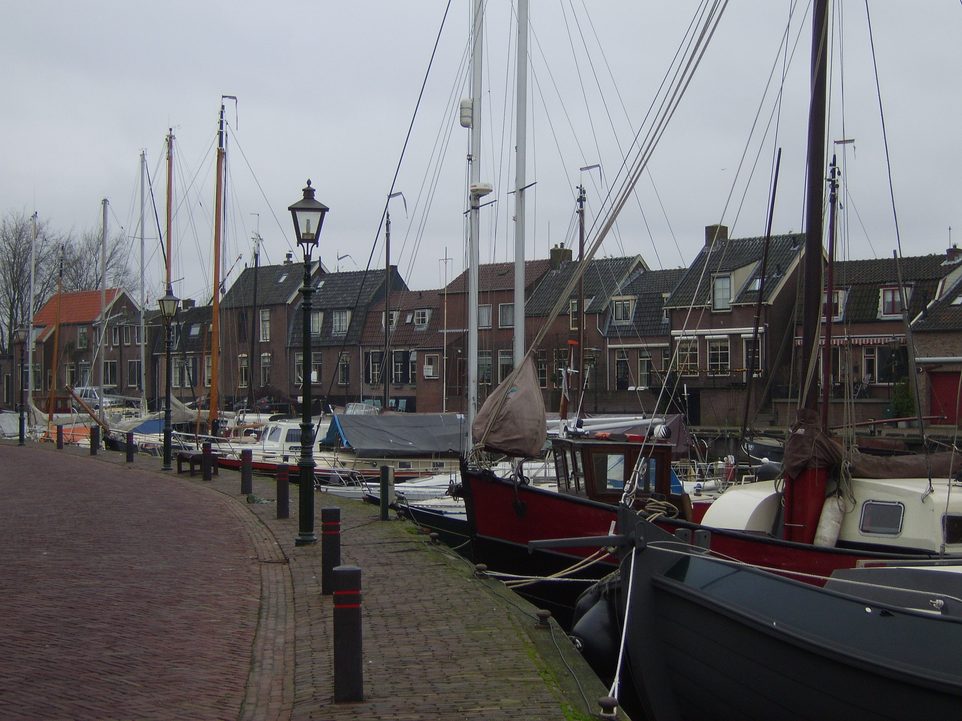 eigen werk